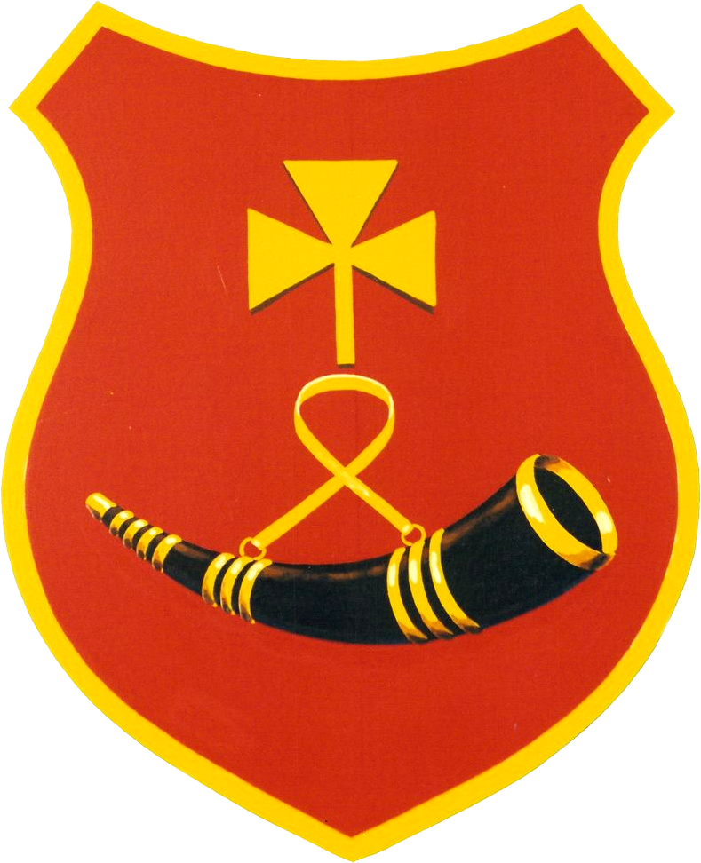 Herb gminy Kraśniczyn